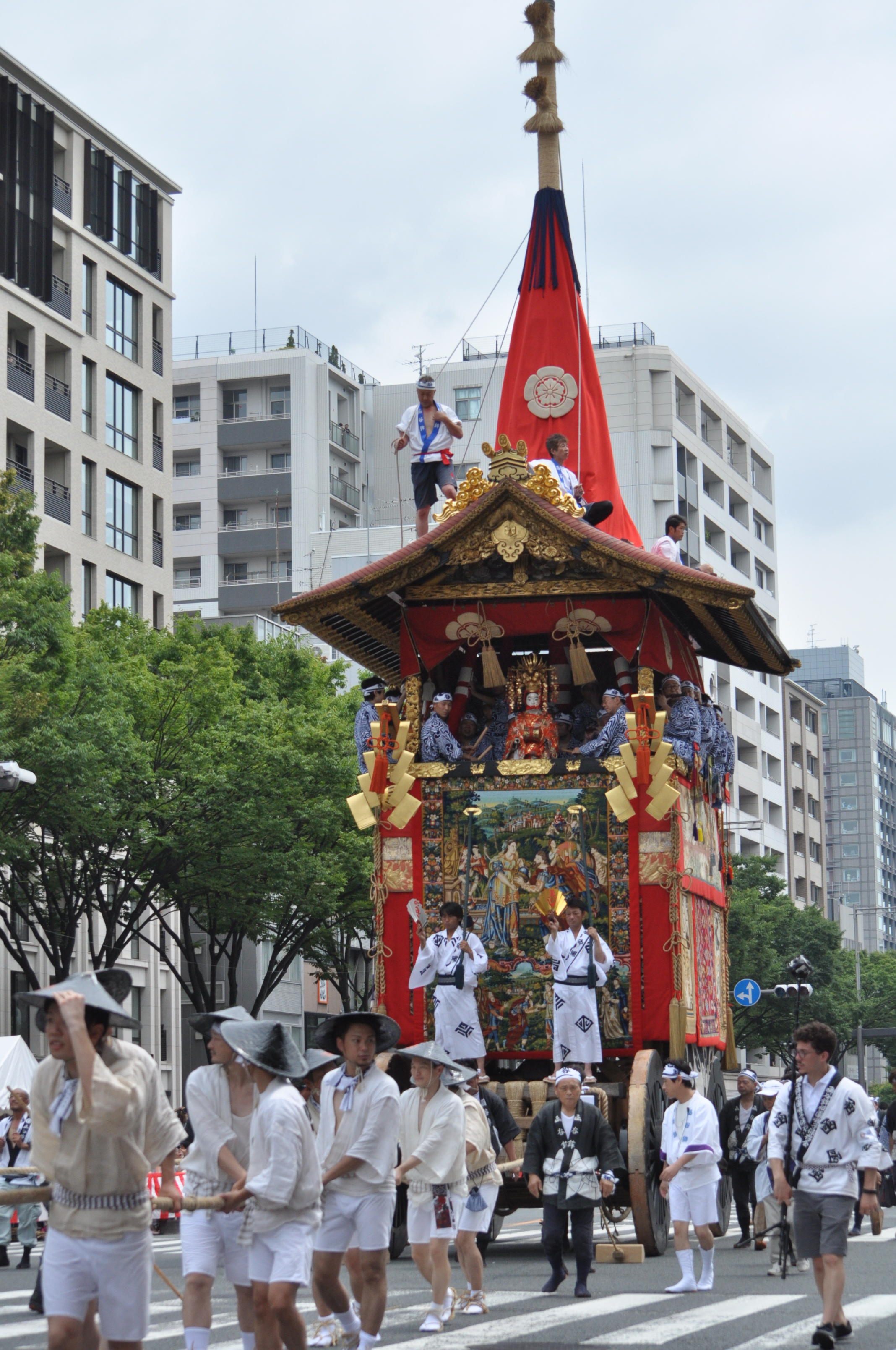 祇園祭 函谷鉾